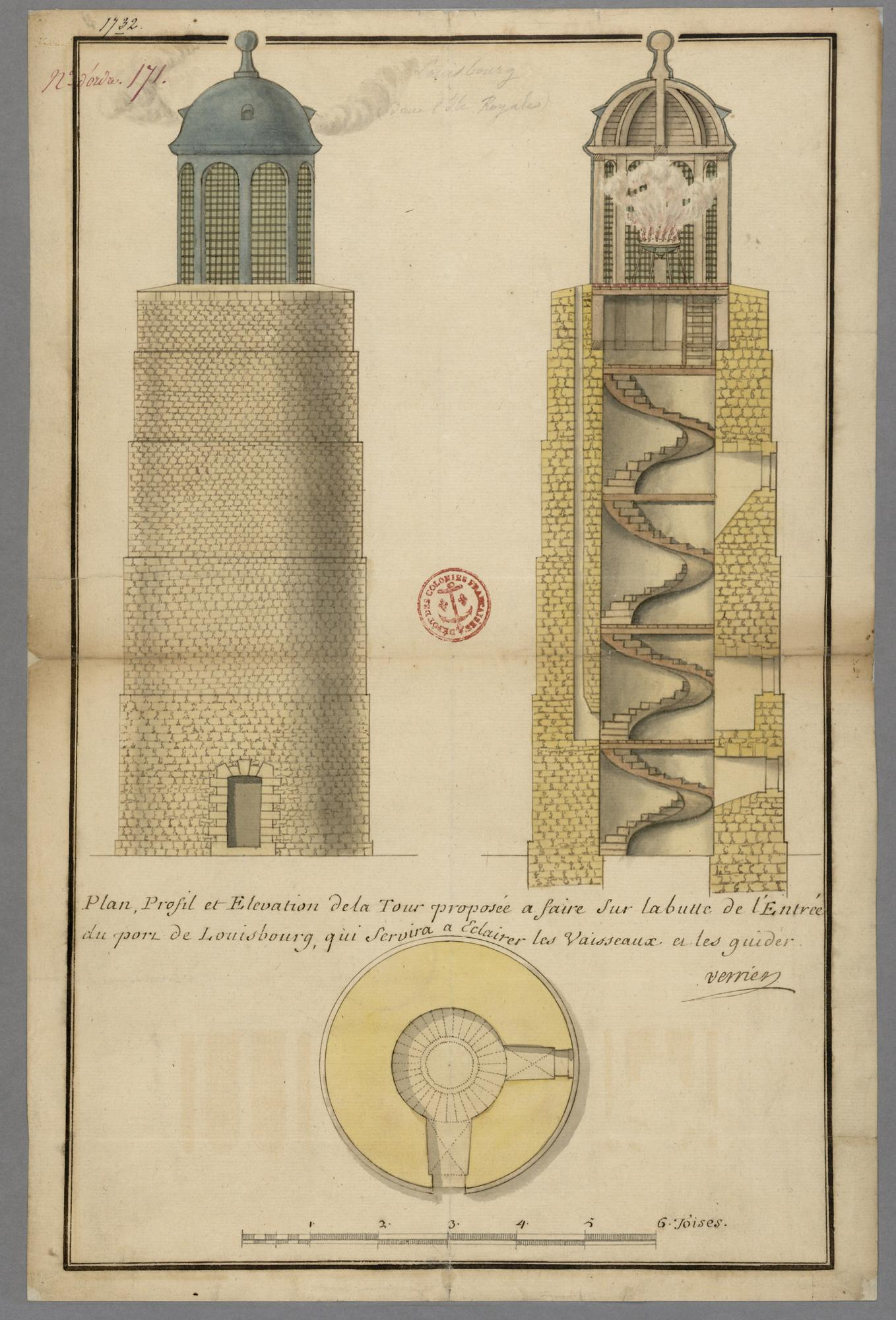 Plan, Profil et Elevation de la Tour propôsée a faire sur la butte de l'Entrée du port de Louisbourg qui servira a eclairer les vaisseaux et les guider.